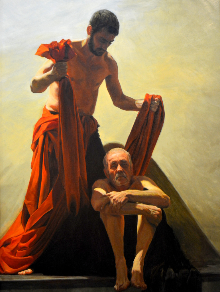 Grins, Martinytsjerke, skilderij Sint Martinus